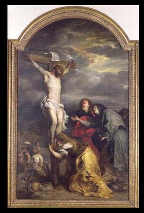 Ukrzyżowanie van Dyckatitle QS:P1476,pl:"Ukrzyżowanie van Dycka" label QS:Lpl,"Ukrzyżowanie van Dycka"